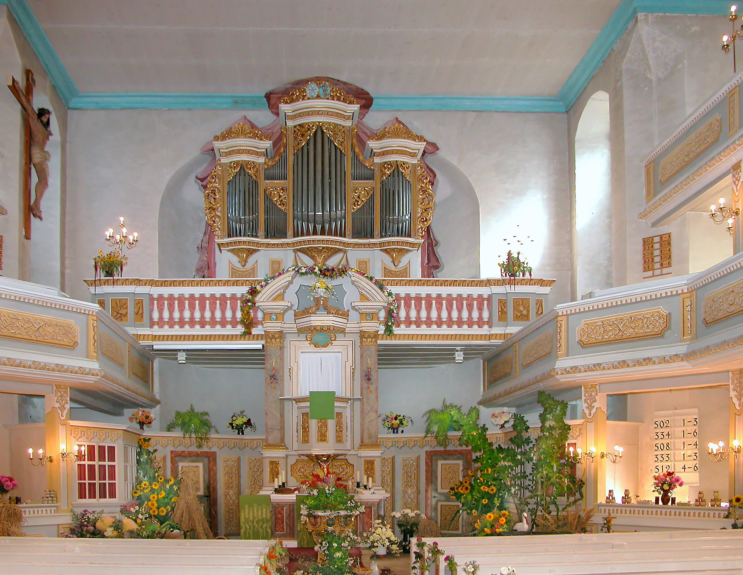 24.09.2006 09509 Forchheim (Pockau-Lengefeld), Kirchstraße (GMP: 50.717333,13.280287): Evangelische Dorfkirche (Barock, 1719-26 von George Bähr und J. G. Fehre). Kanzelaltar (1725, bemalt von Johann Christian Buzaeus) und Orgel (Gottfried Silbermann, 1726). Schmuck zum Erntedankfest. [DSCN11715.TIF]20060924285DR.JPG(c)Blobelt